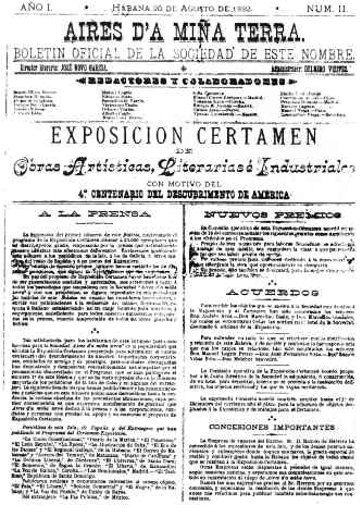 Aires d’a Miña Terra. Habana agosto de 1892